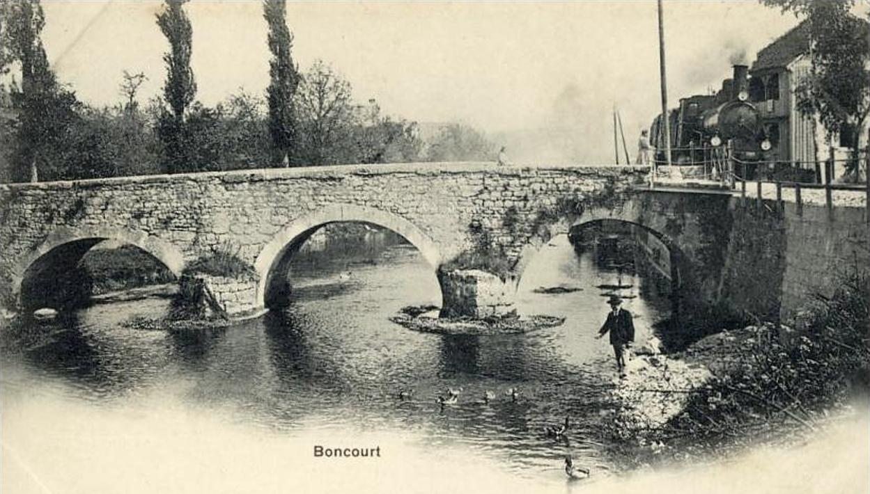 Die grenzüberschreitende Eisenbahn von Pruntrut nach Delle (Frankreich) mit dem Schweizer Grenzbahnhof Boncourt wurde am 23. September eröffnet. Am 16. August 1876 ging sie an die Jura Bernois (JB) über.